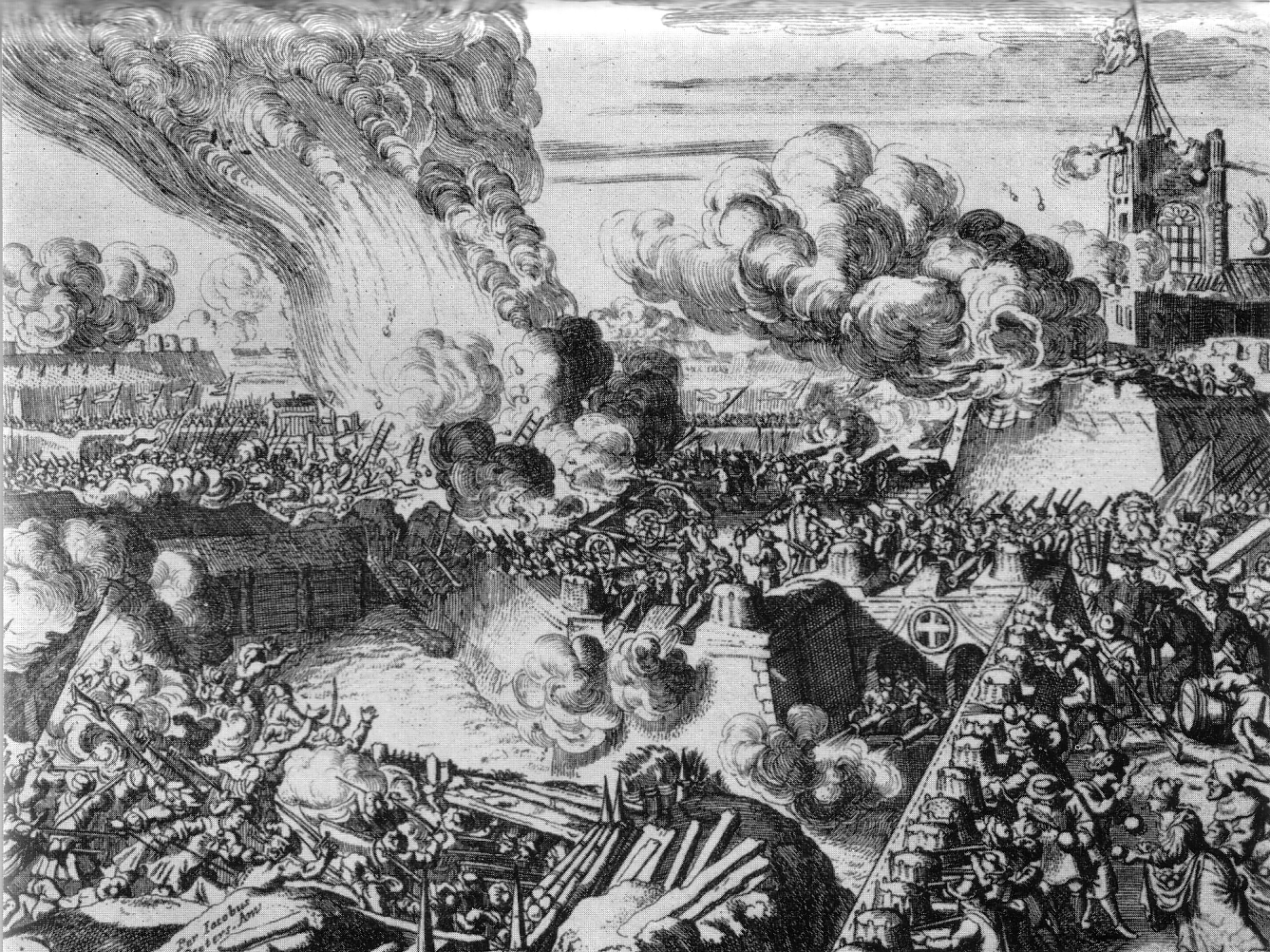 2. Türkenbelagerung; Angriff der Wiener auf die Türken